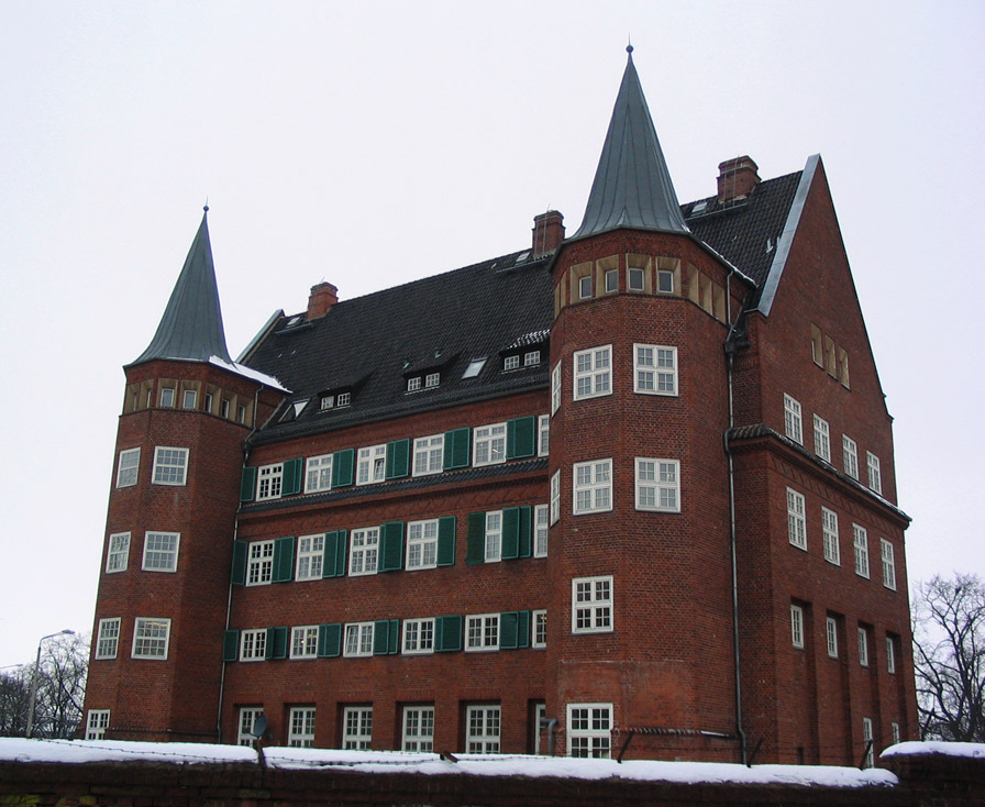 Beschreibung: building of the "Deutsche Bank" in Stralsund Fotograf: Darkone, 27. Januar 2005